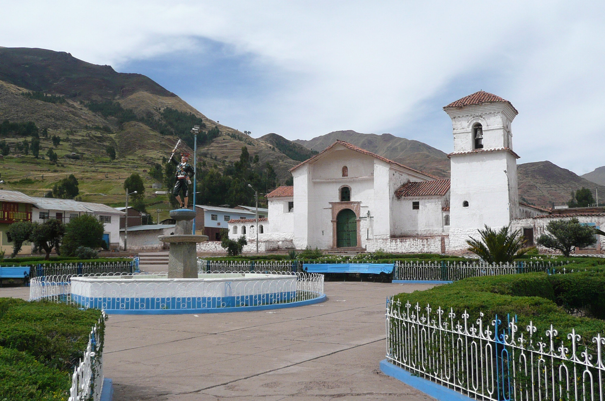 Templo de Marangani